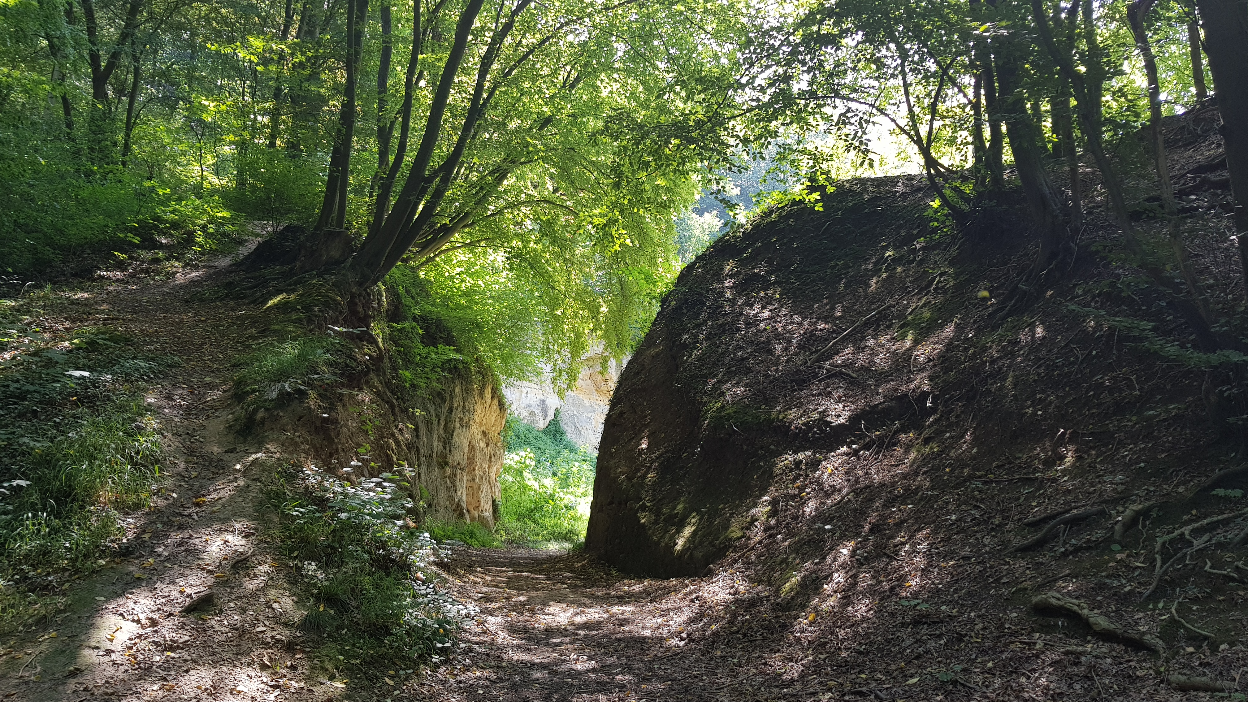 Geologisch Monument Groeve Trichterberg, Savelsbos, Gronsveld, Nederland